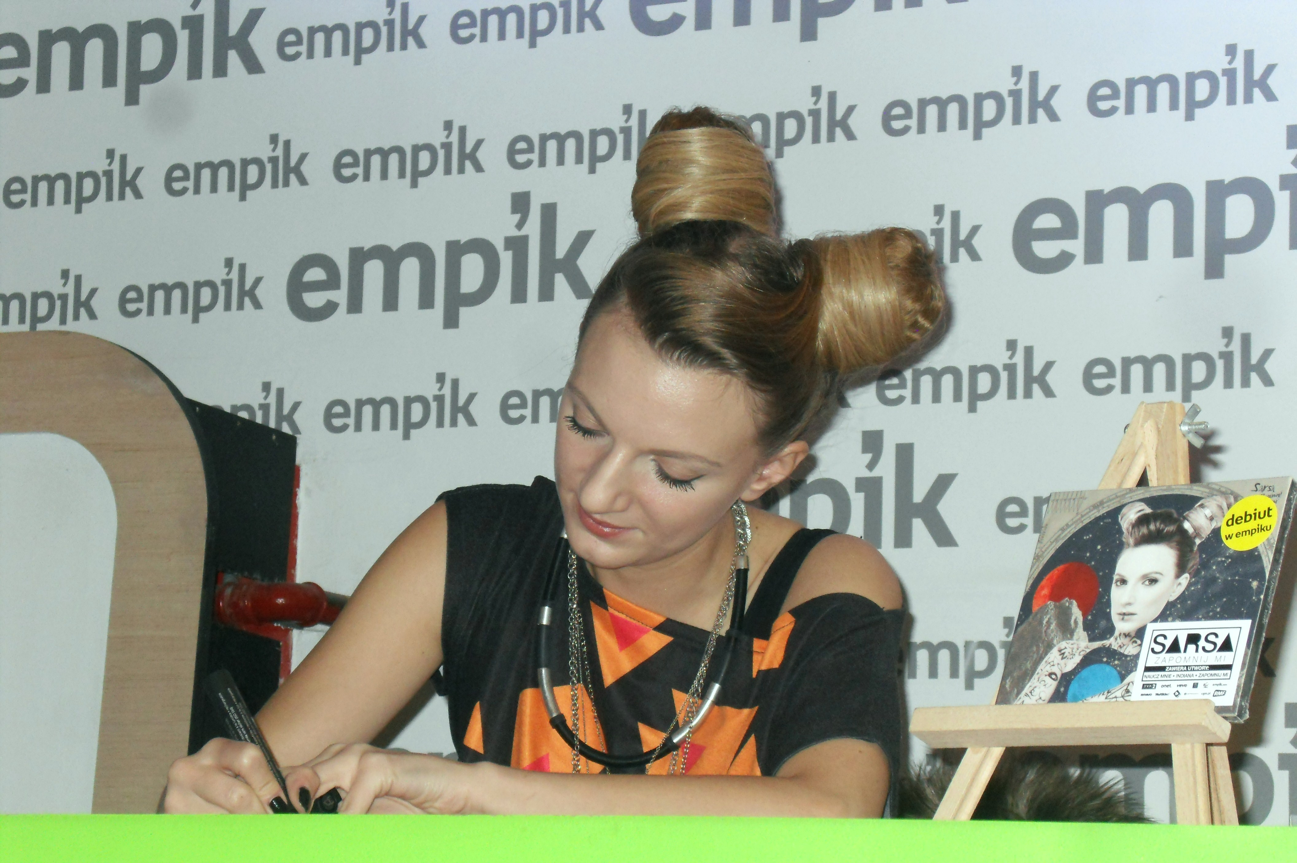 Sarsa (Marta Markiewicz) i płyta "Zapomnij mi" we wrzeszczańskim EMPiKu (Galeria Bałtycka).